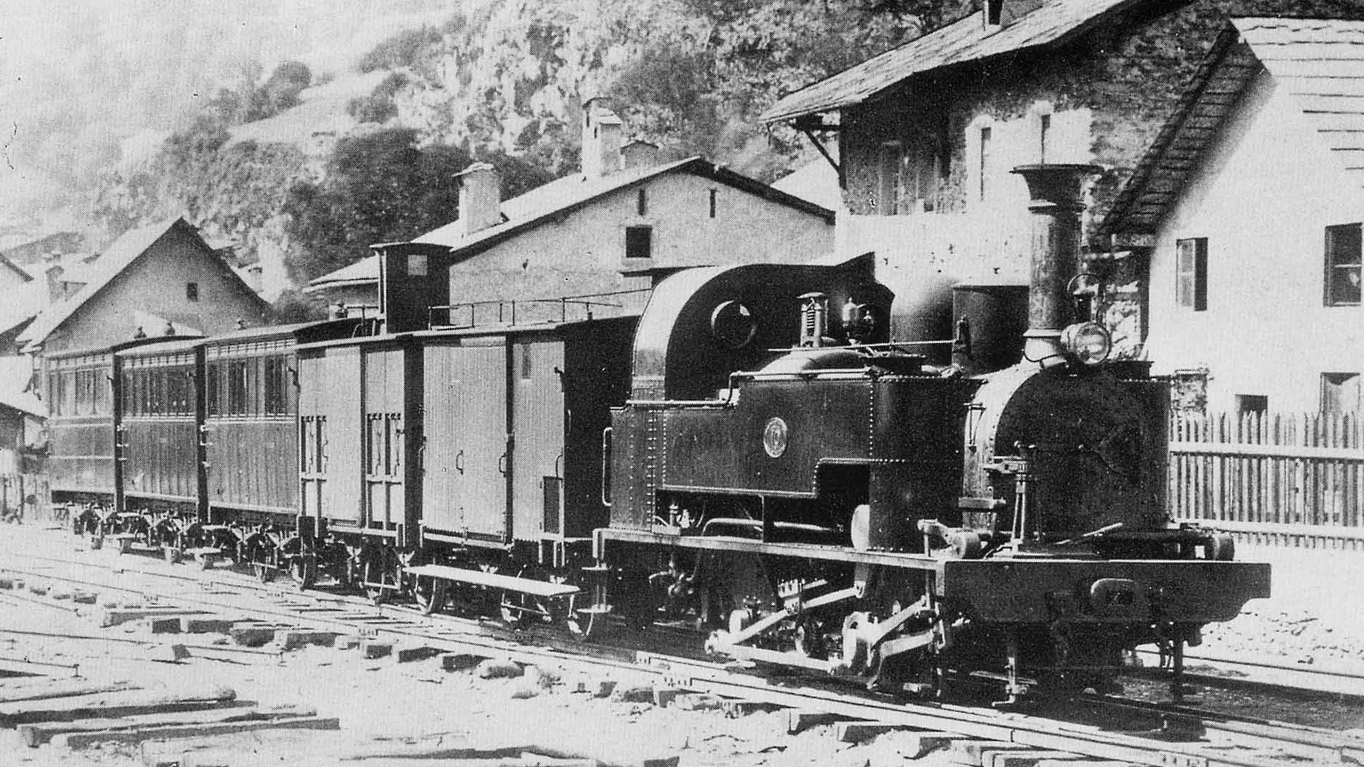 Zug der ehemaligen Mont Cenis-Bahn (MC) System Fell im italienisch französischen Grenzgebiet. Ein Personenwagen der Mont Cenis-Bahn ist bei der Museumsbahn Blonay–Chamby in der Schweiz erhalten geblieben.